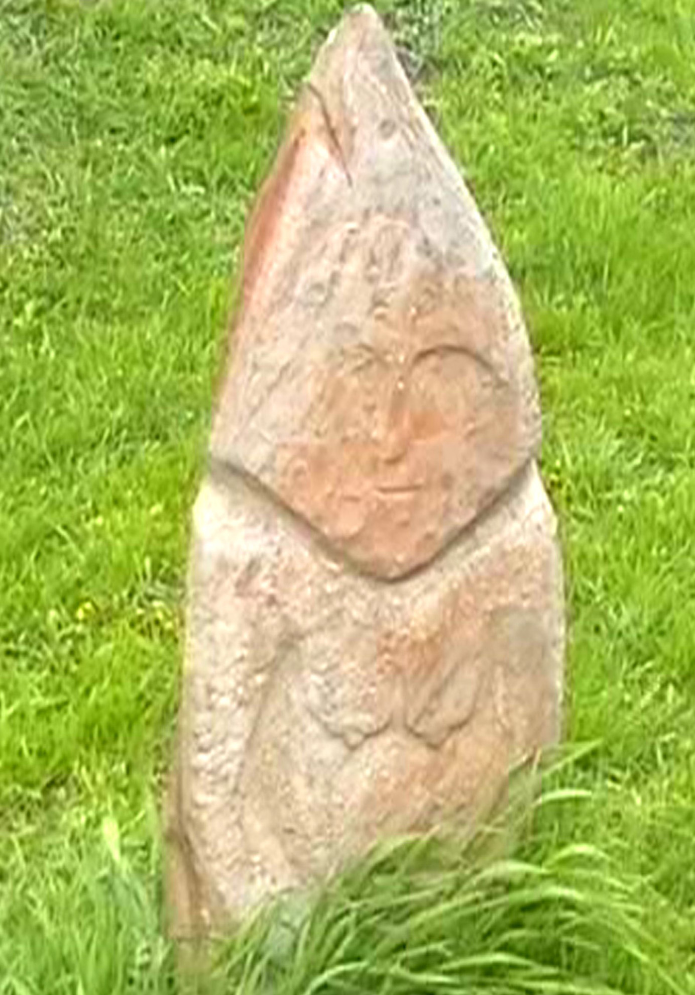 Kipchak stone statues (Ukraine)